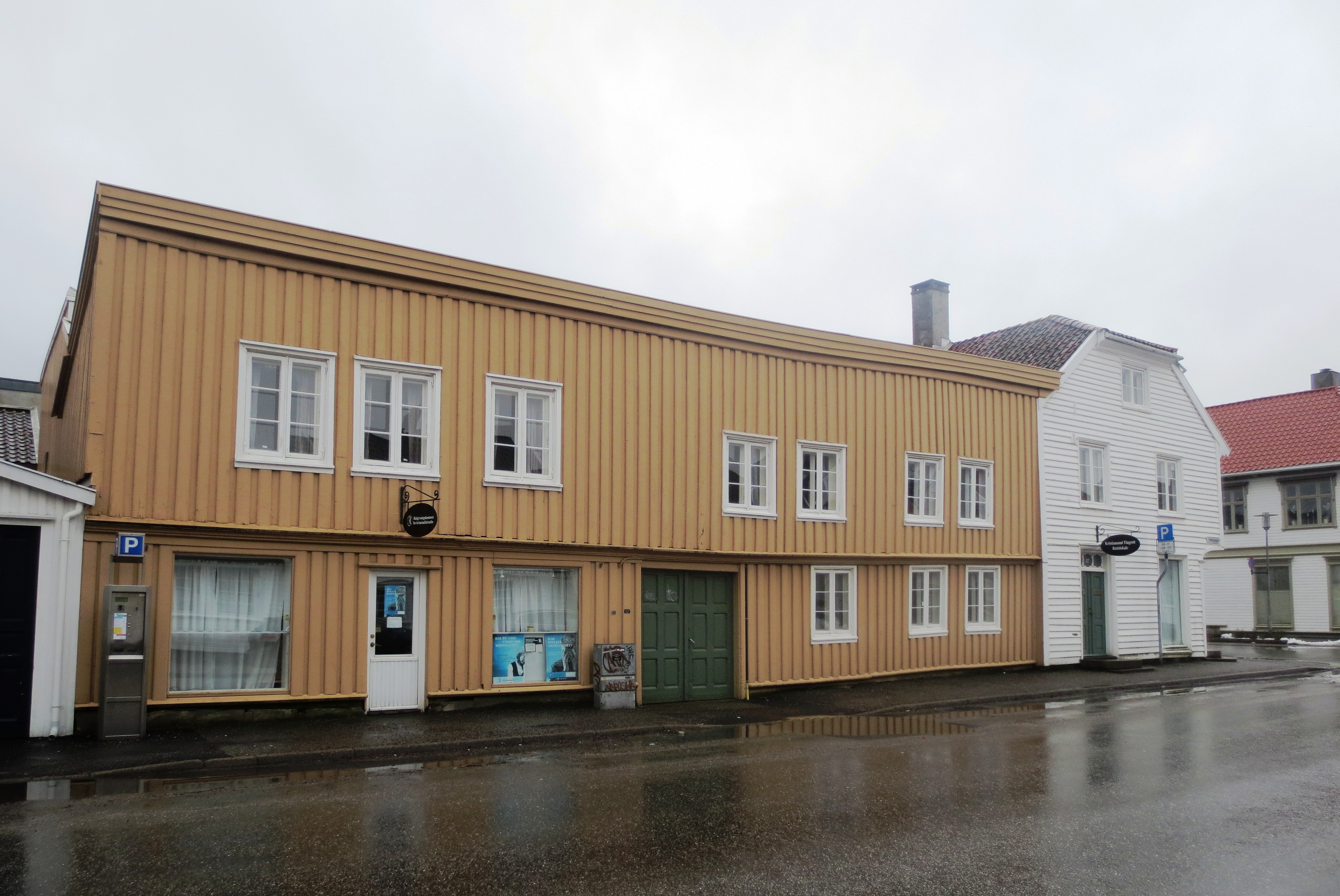 Holbergs gate 17, ved hjørnet mot Rådhusgata, i Kristiansand.